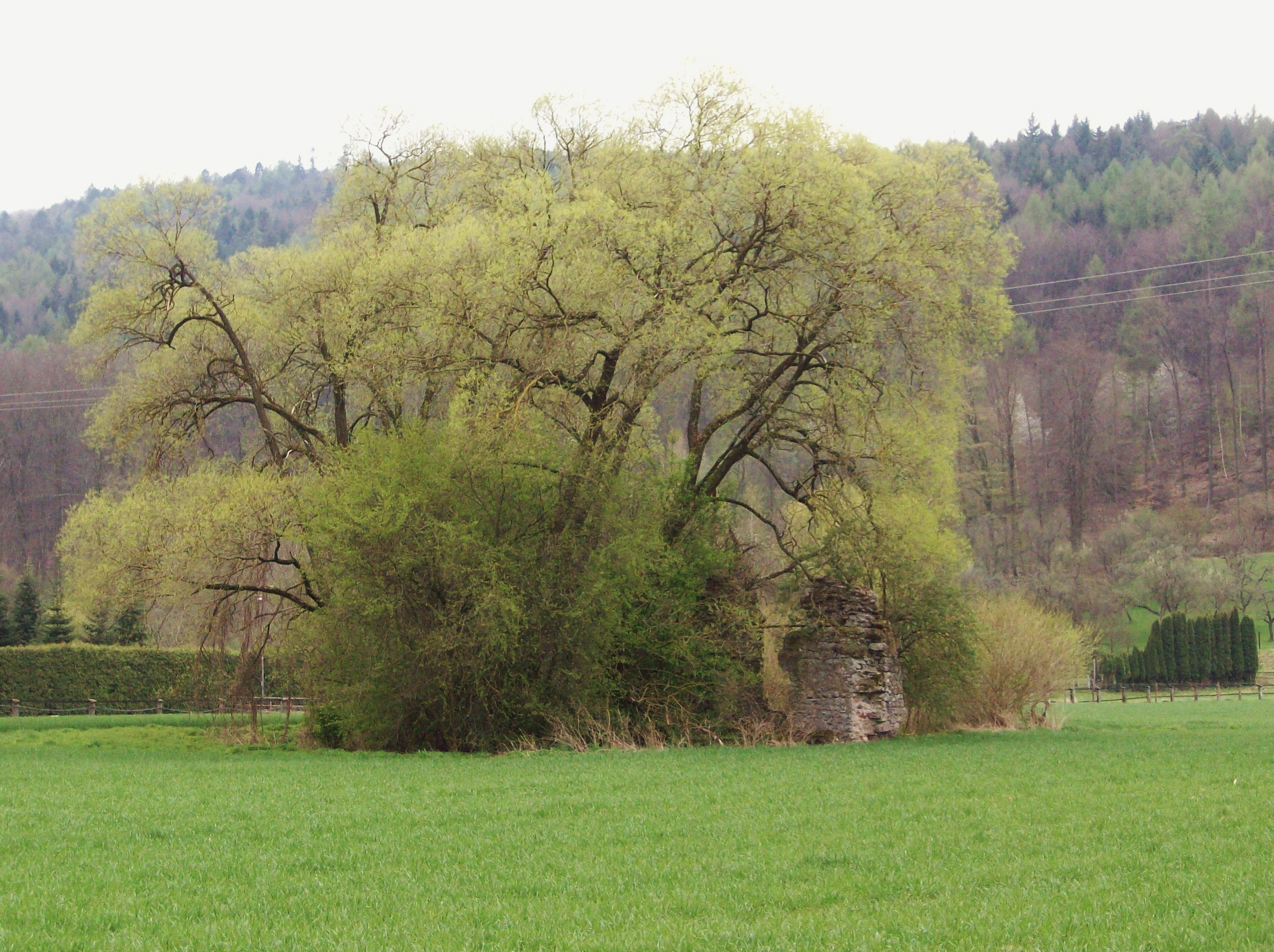 Die Reste der Bacheburg auf dem freien Feld vor dem Neustädterhof, Ortsteil von Obernburg. Um 1400 gebaut, bestand sie nur vierzig Jahre bis zur Zerstörung durch Kurmainzer Reiter. Das sind die Reste der zweiten Burg der Niederadligen von Bache, deren ältere Burg sich hinter dem Neustädter Hof auf einem Hügel befunden haben soll. Sie war eine Wasserburg, die inzwischen verlandeten Gräben sind noch zu erahnen.